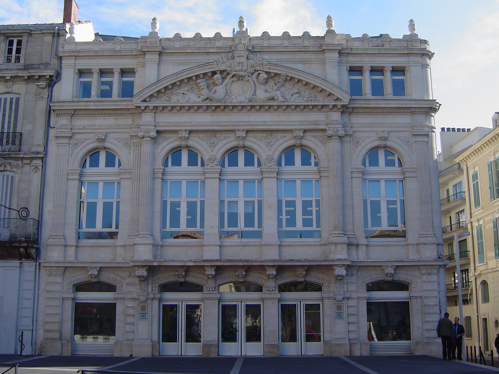 Faculté des Sciences de Nîmes-site des Carmes ; ancienne façade du théâtre de la Renaissance ( vers 1880 )